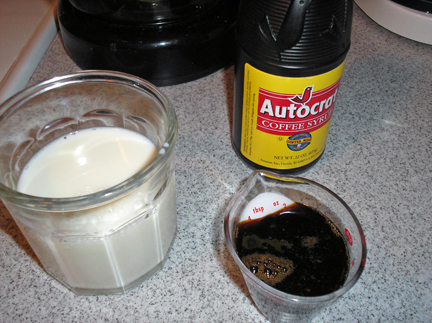 Coffee milk ingredients